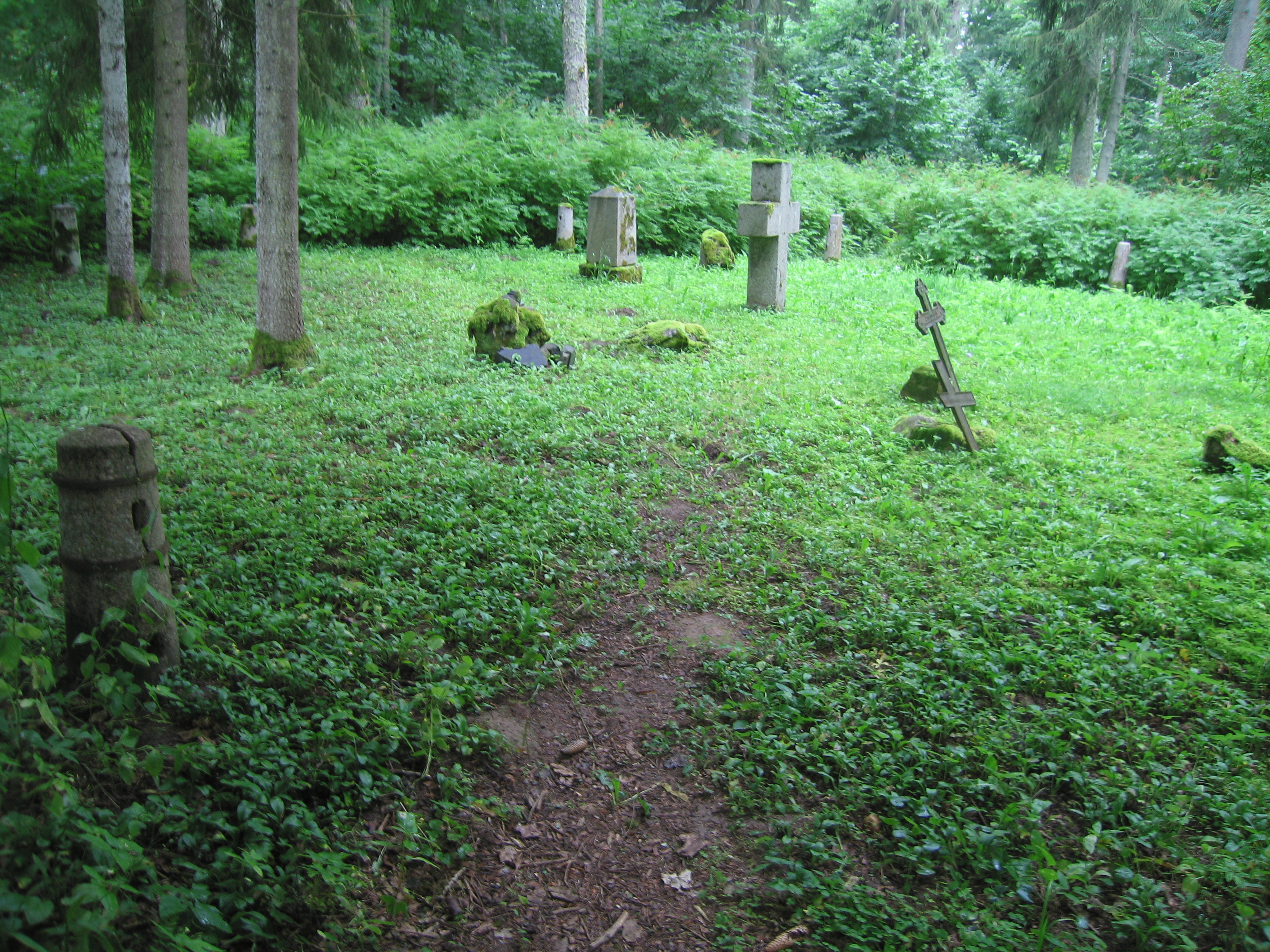 Vaade kalmistule idaväravalt. Taga on ümara kujuga kalmistut piiravad graniitpostid